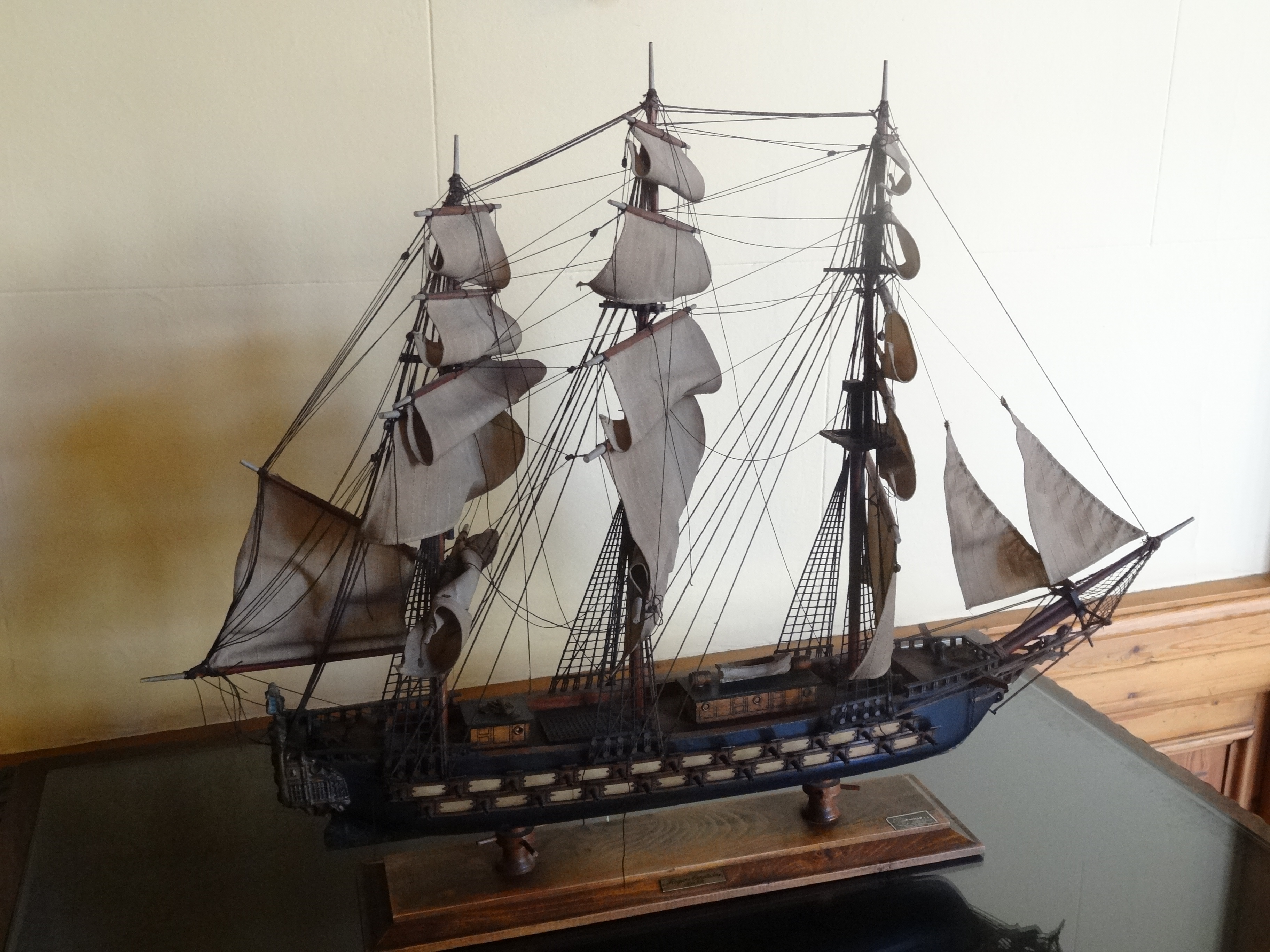 Capitania General de Barcelona